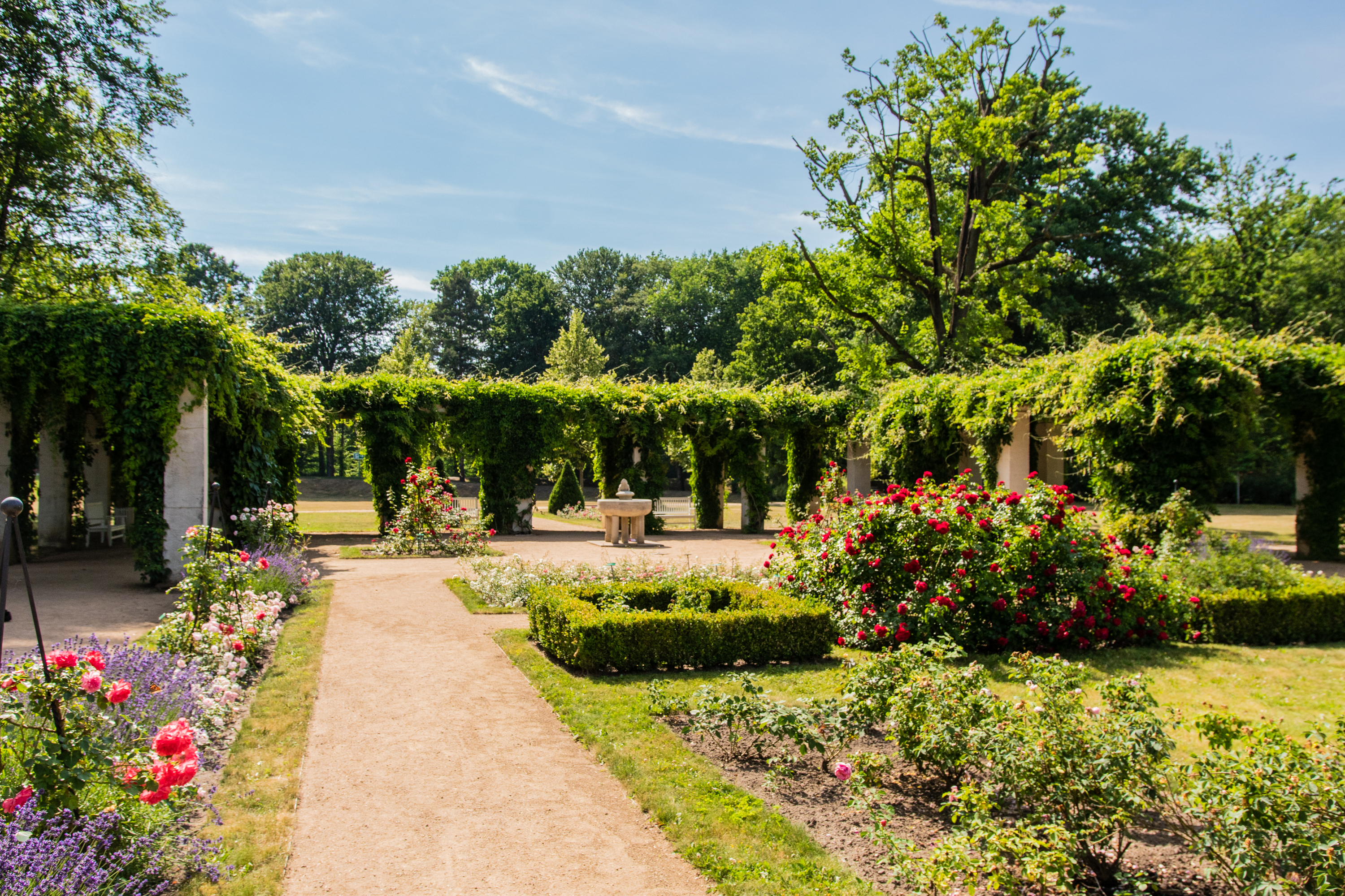 Der Pergolenhof auf der Wehrinsel im Ostdeutschen Rosengarten Forst (Lausitz).